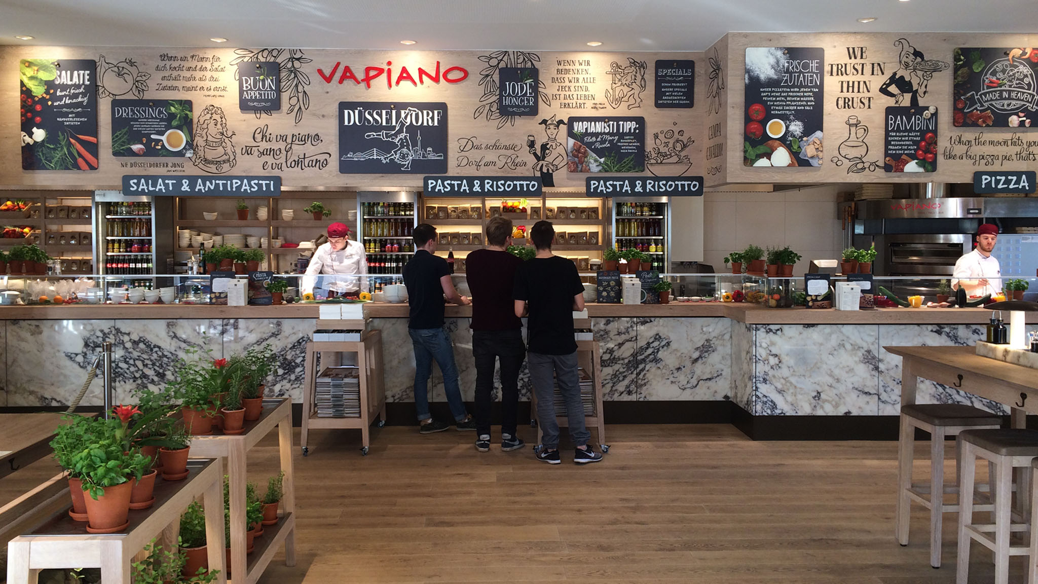 Vapiano Restaurant Düsseldorf